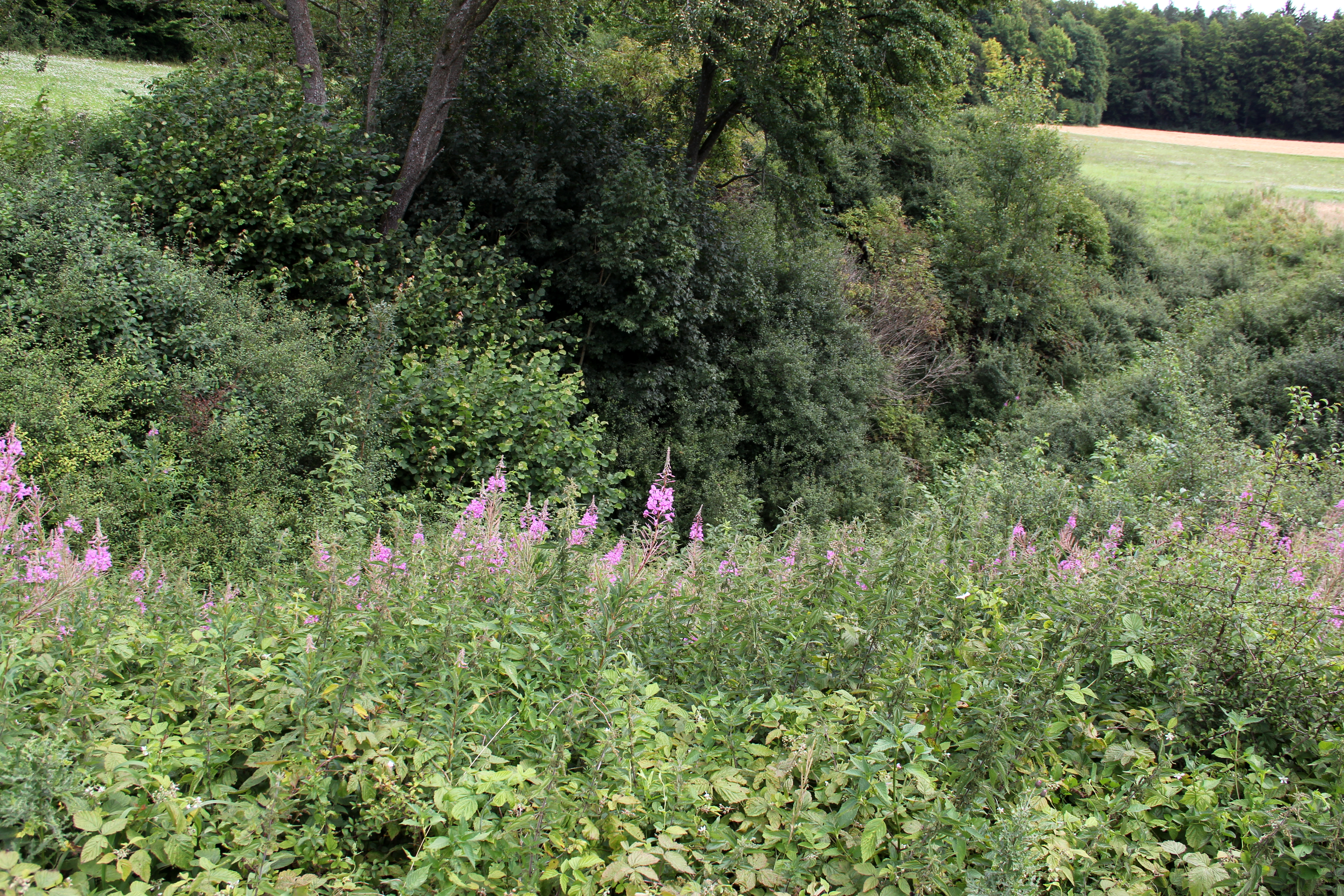 Fellner Doline, natürlicher Einstieg